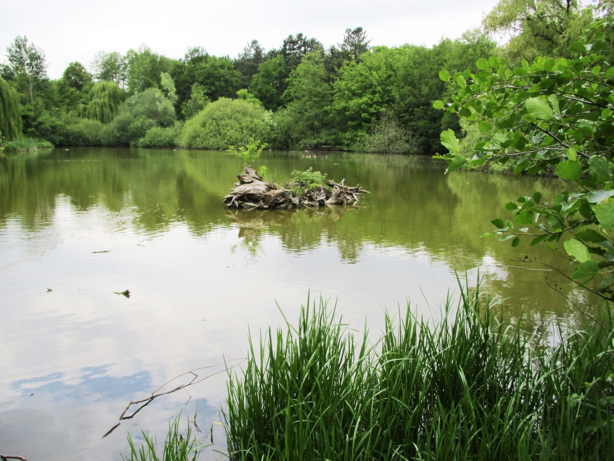 Martin-Luther-King-Park, Frankfurt am Main-Niederursel, Weiher in der Mitte des Parks